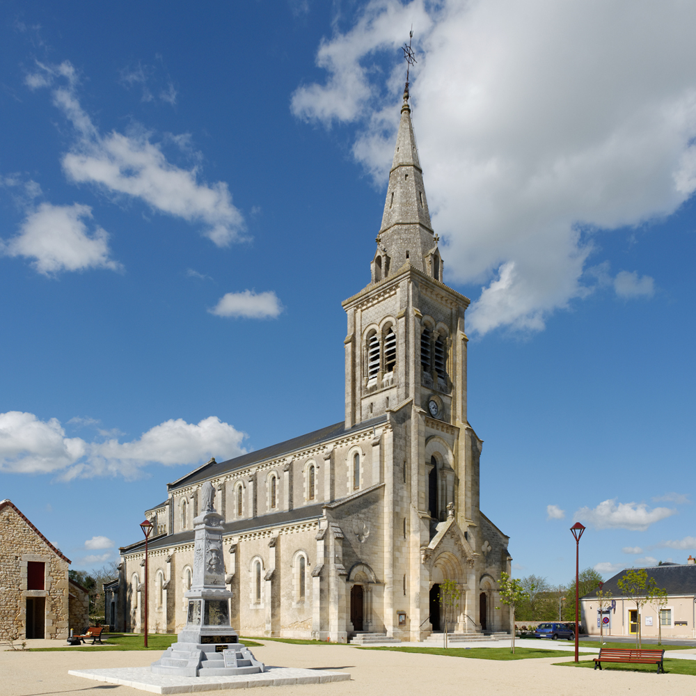 Eglise Saint-Martin de Tournon Saint-Martin